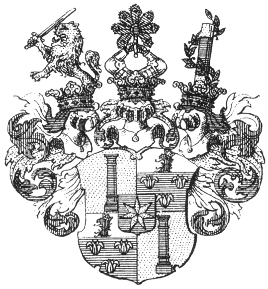 Gyllenstierna av Fogelvik (grev 1706 nr.47, +1720)